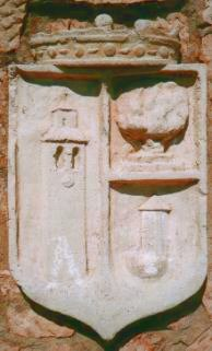 Escudo Villa de Boñar